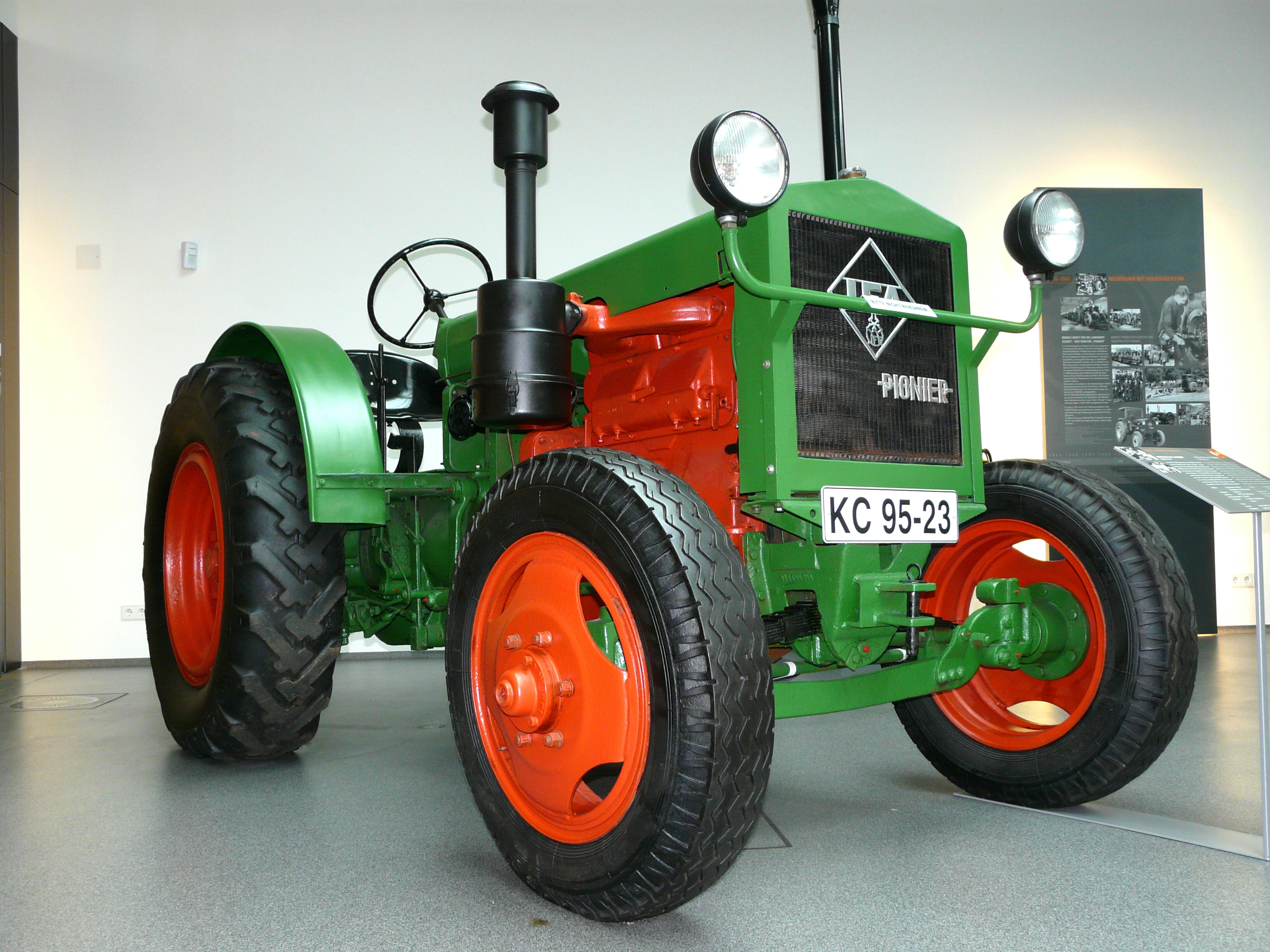 IFA RS 01/40 „Pionier“; Traktor von 1949, der Anfang der 1950er Jahre am meisten eingesetzte Traktor in der DDR-Landwirtschaft